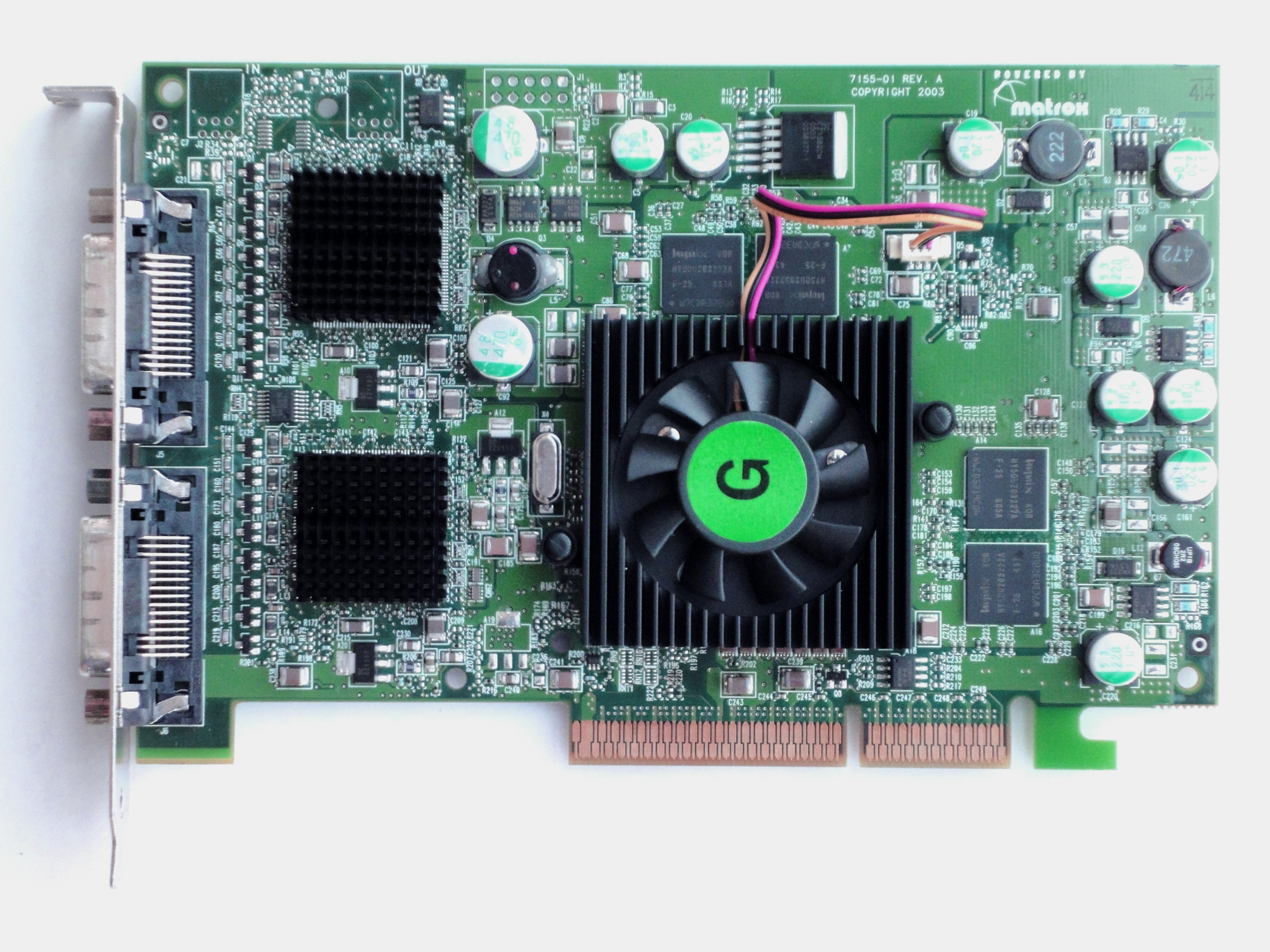 Matrox QID 128MB